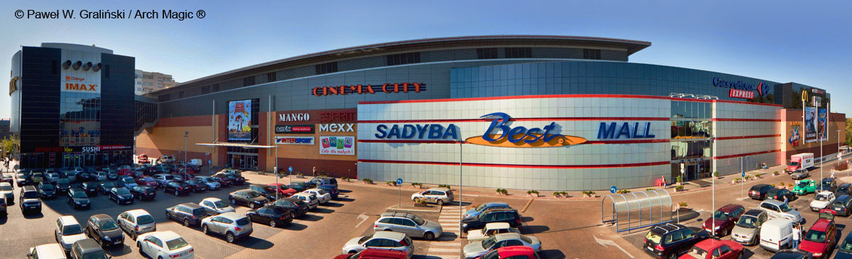 Sadyba Best Mall Warszawa widok panoramiczny